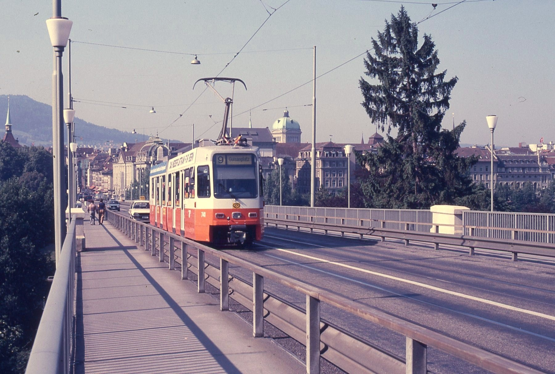 hoto. Trams aux Fils. Prise en 1986 Ligne 9 Motrice prototype Vevey "DAV" Be 4/6 741 des TPG effectue des courses d'essai Autres photos